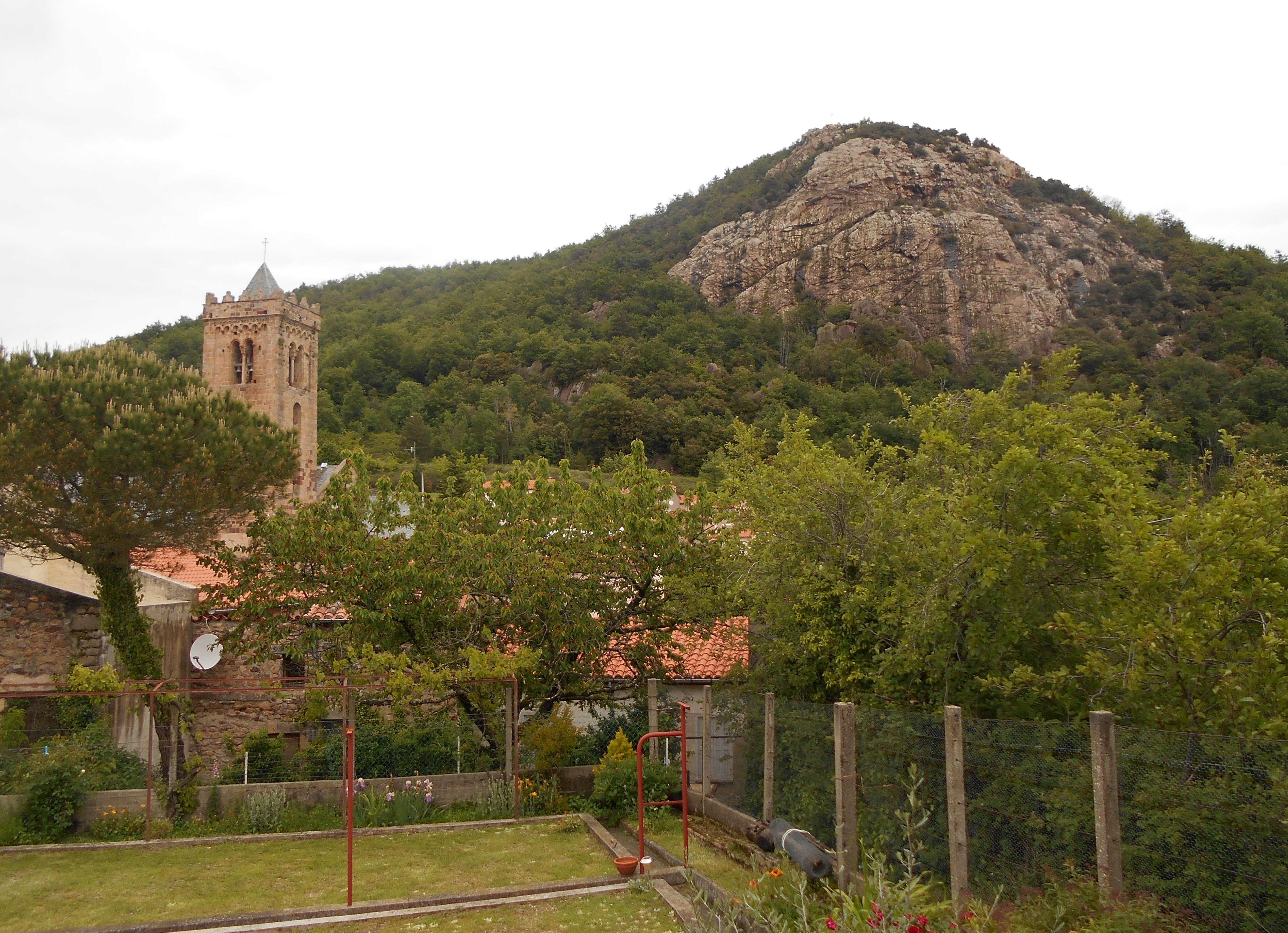 El Roc de la Creu de Costoja